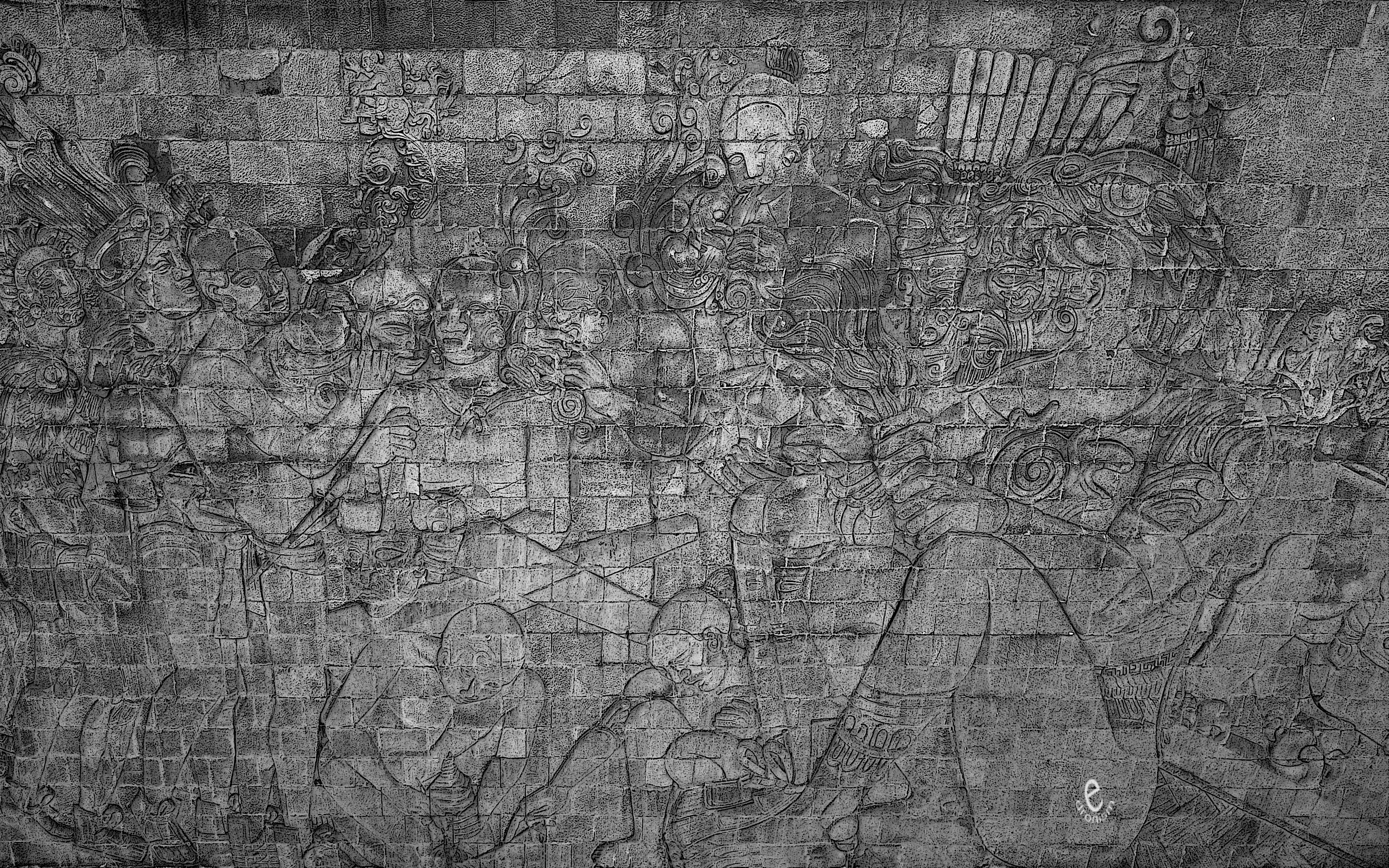 Las enseñanzas de Quetzalcoatl, bajo relieve, 1958, Federico Cantú. Centro Médico Nacional Siglo XXI. Ciudad de México